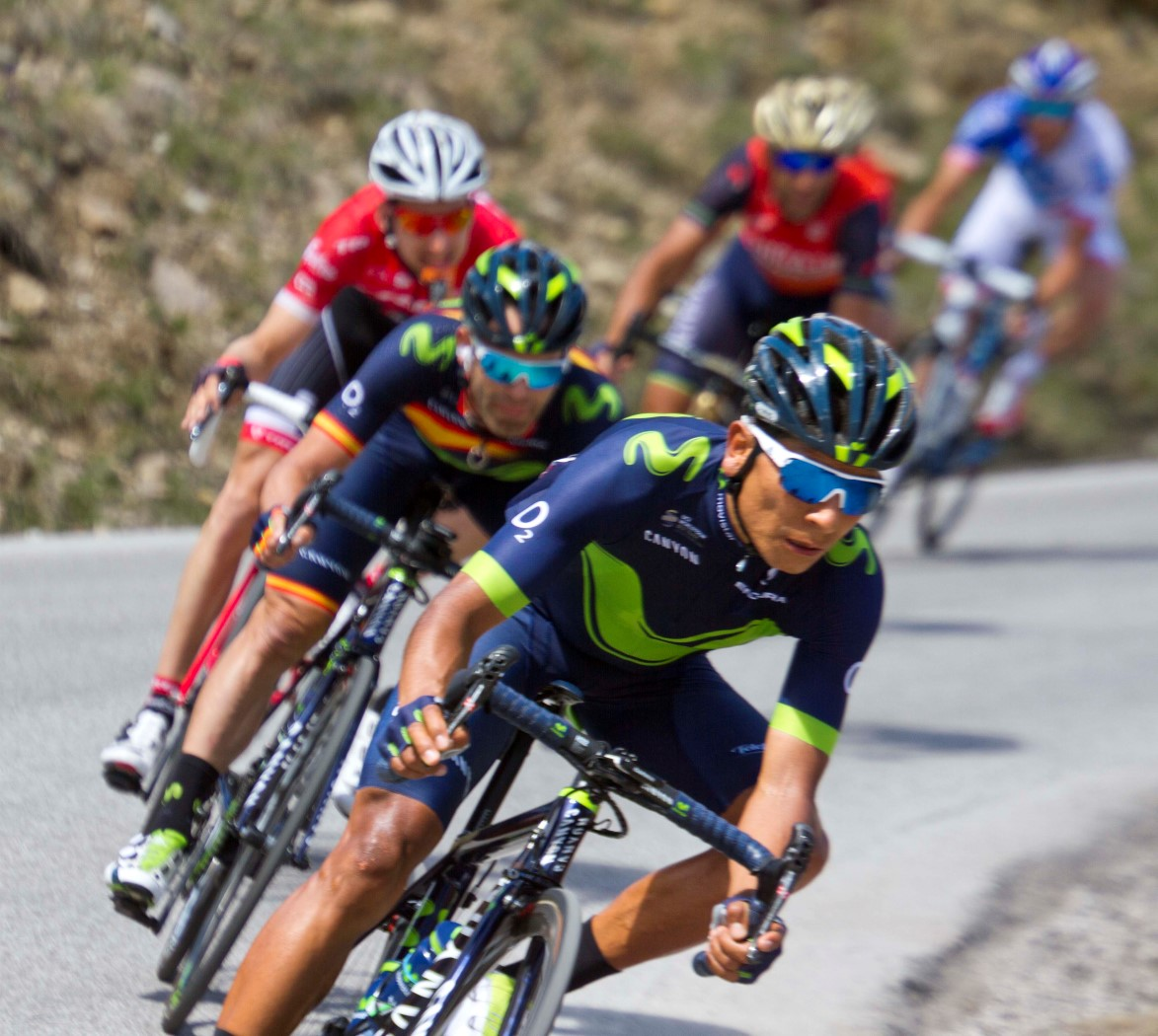 199 quintana